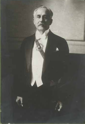 Retrato del Vicepresidente Luis Barros Borgoño